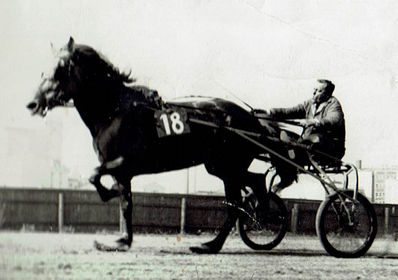 Jan-Erik ohjastaa Murron Jennyä 1939